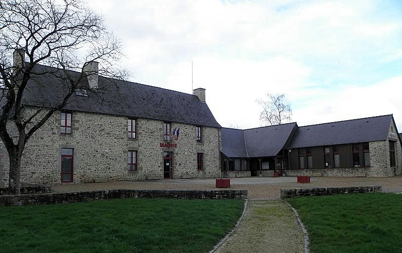 Mairie de Gosné (35).